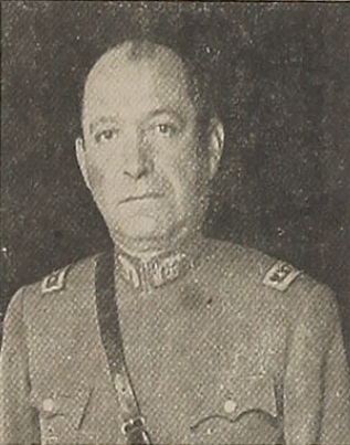 Oscar Escudero Otárola (San Felipe, 22 de marzo de 1891 – Santiago, 4 de agosto de 1957) Militar chileno, fue Comandante en Jefe del Ejército y Ministro de Defensa.